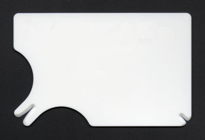 Zeckenkarte zur Entfernung einer Zecke